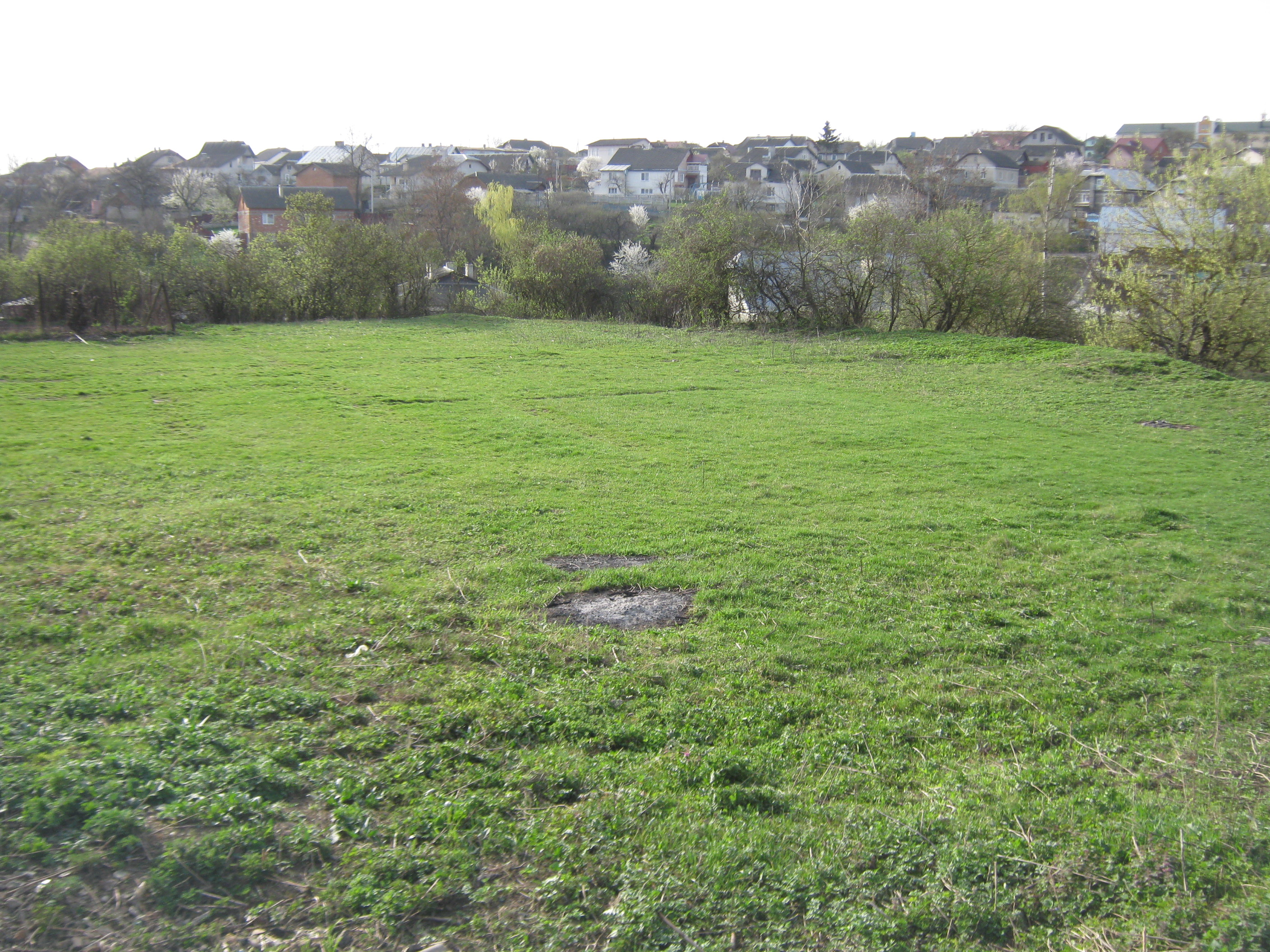 Місце, де була школа на бараках, Бучач, 2016